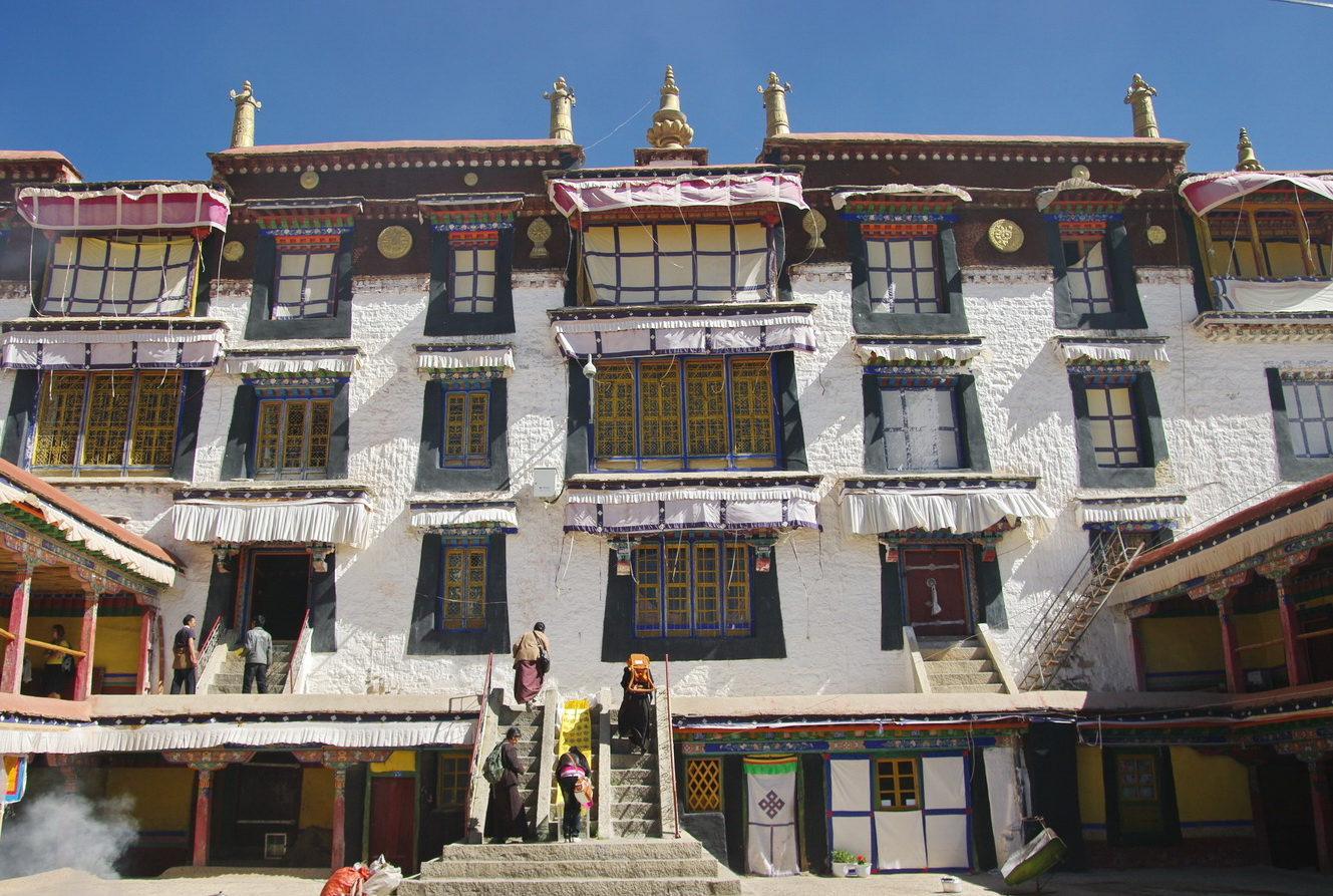 Eingang Ganden Phodrang, Drepung